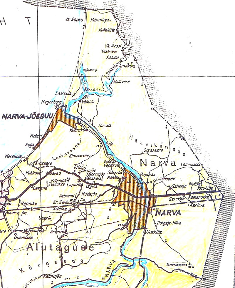 Волость Нарва. Фрагмент карты административного деления Эстонии.